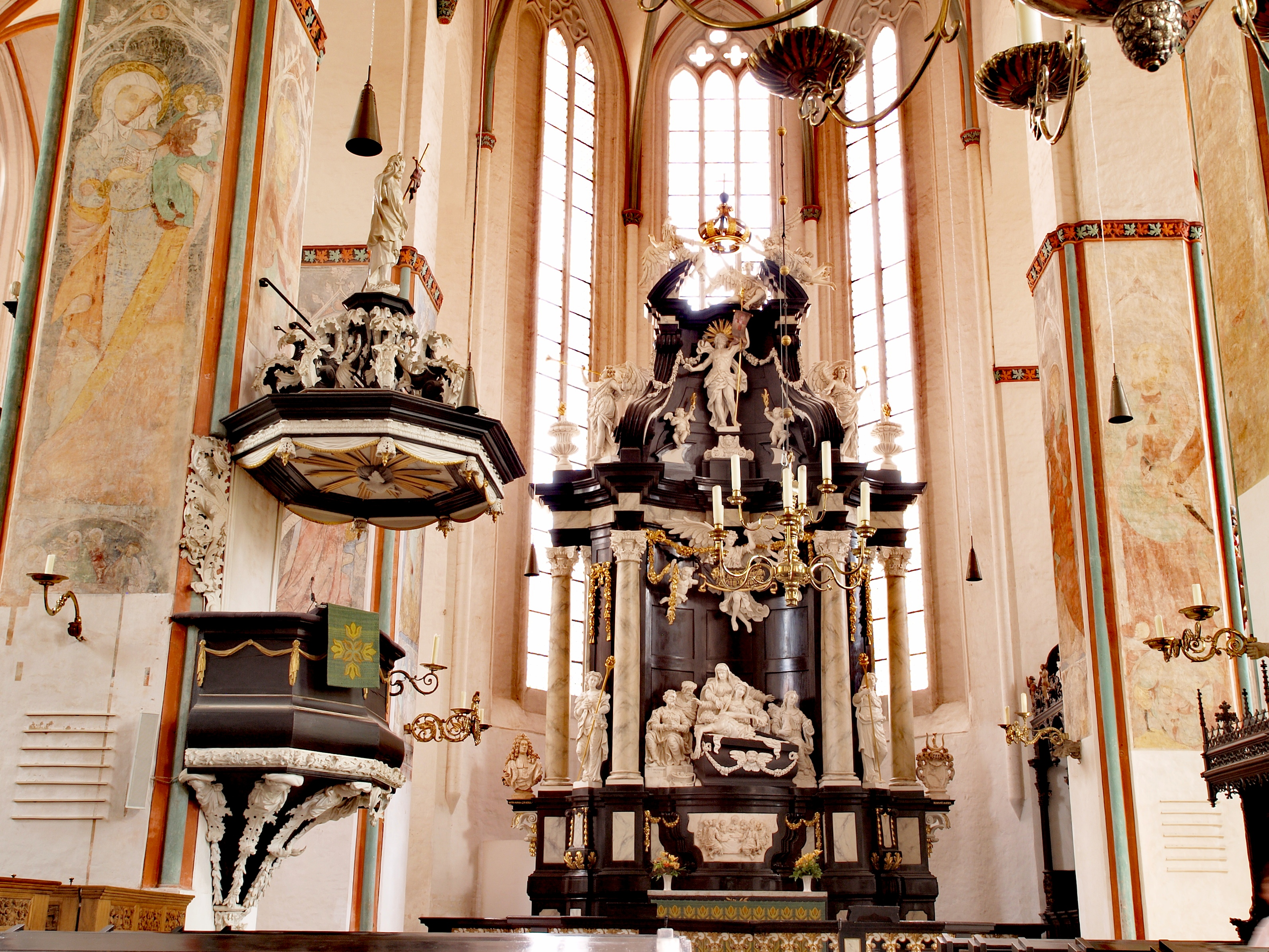 Kanzel und Altar (Hieronymus Hassenberg) der Kirche St. Jakobi in Lübeck